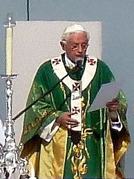 Papst Benedikt XVI. bei der Angelusprdeigt seiner Freiburger Sonntagsmesse.